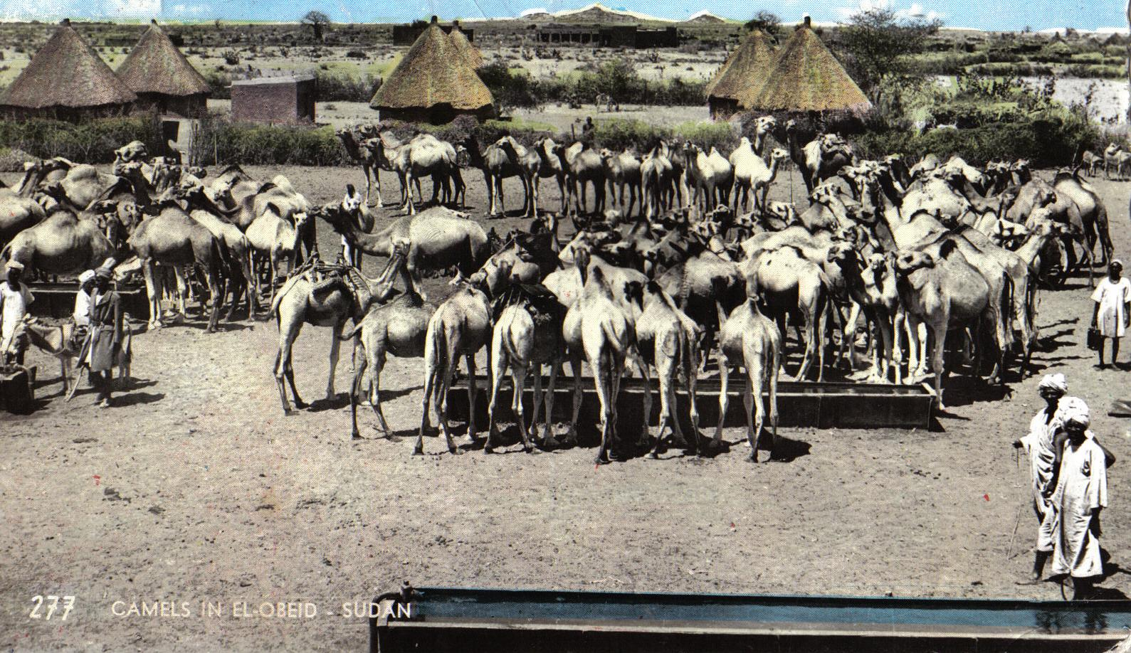 Camels in El Obeid (Al-Ubayyid), Sudan